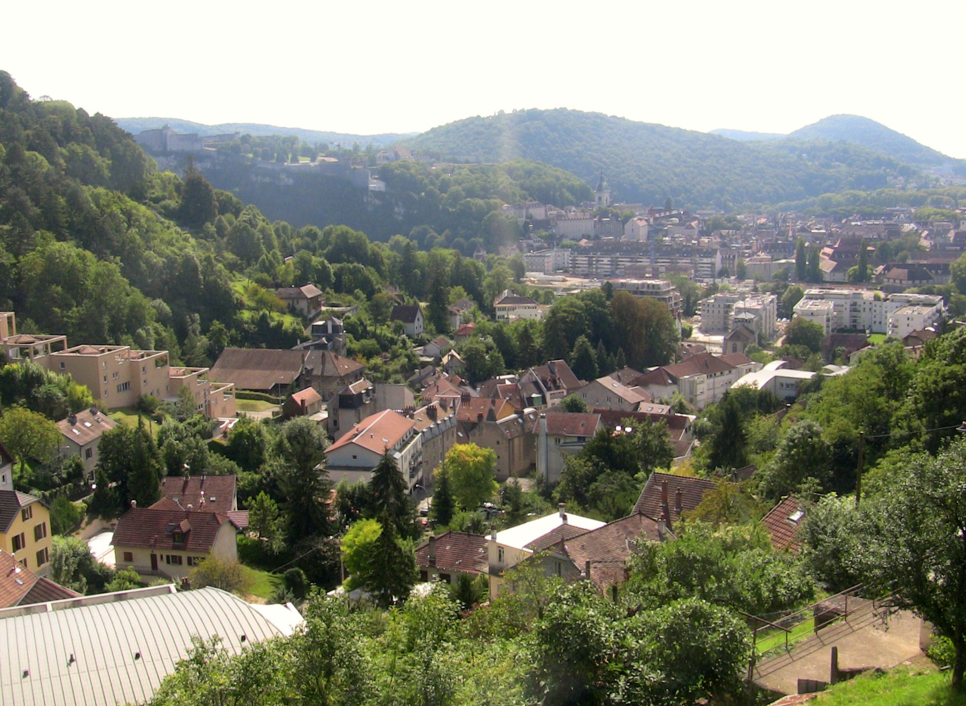 Bregille village, à Besançon (Doubs, France).